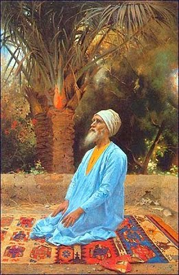 "La Oración", 1894, por Pierre Jan Van Der Ouderaa (1841-1915).